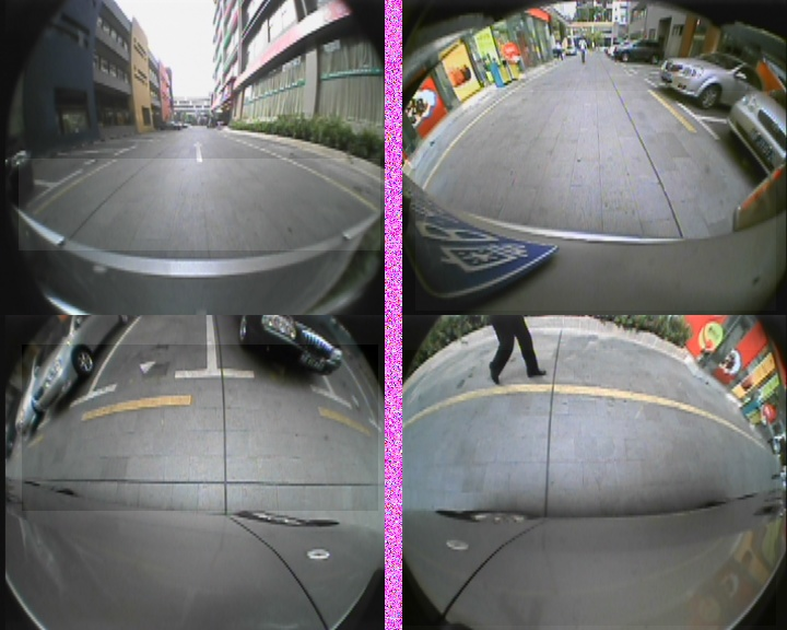 全景泊车系统四路原始输入图像